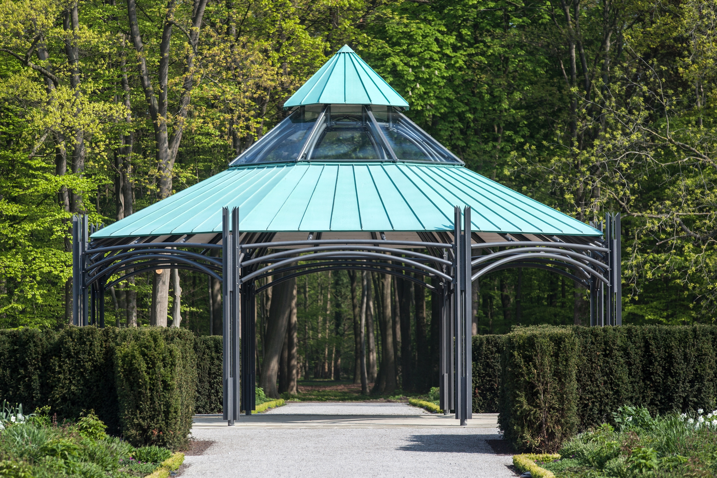 Ein Pavillon bildet den Mittelpunkt des Schlossparks.